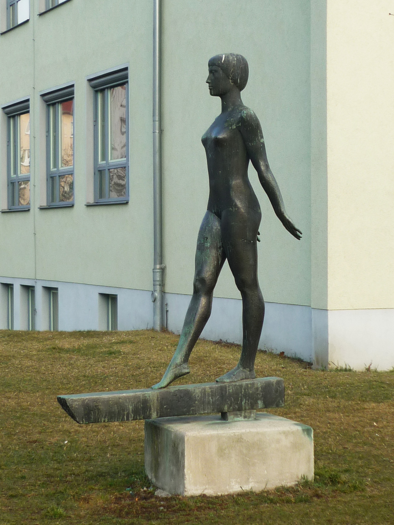 Skulptur Turnerin an der Grundschule in der Schweizer Str. in Dresden-Südvorstadt (von Herbert Burschik, 1962)